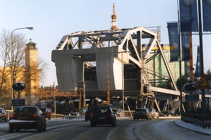 Den äldre delen av Danviksbron.